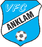 Logo des VFC Anklam